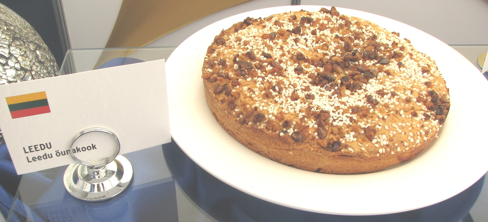 Leedu õunakook